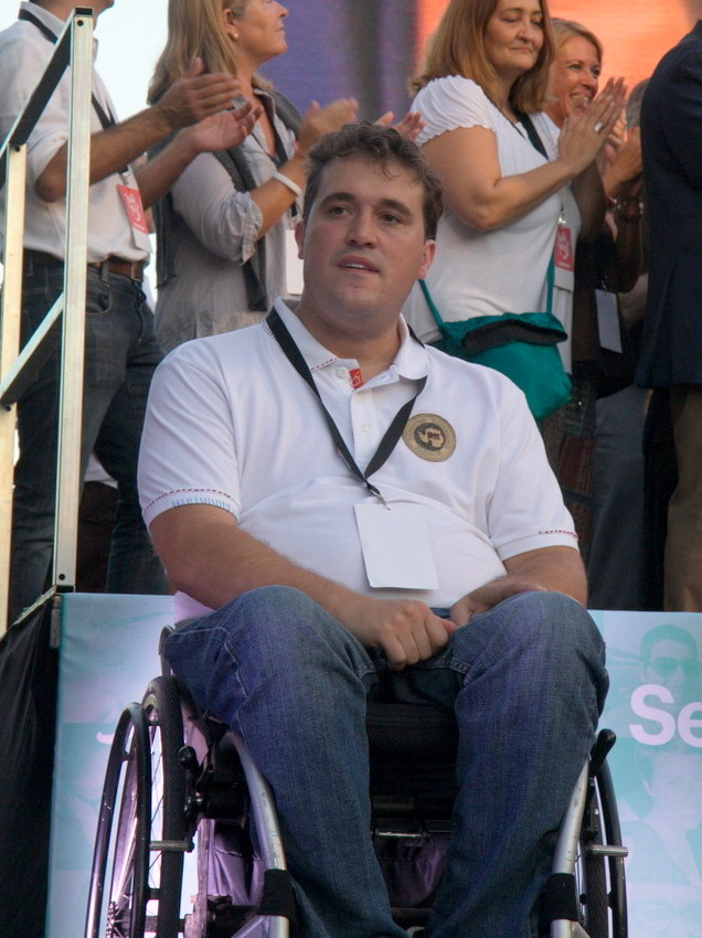 Acte de presentació de tots els candidats de la llista Junts pel Sí a Barcelona, al Psg.Lluís Companys. (28-8-2015)